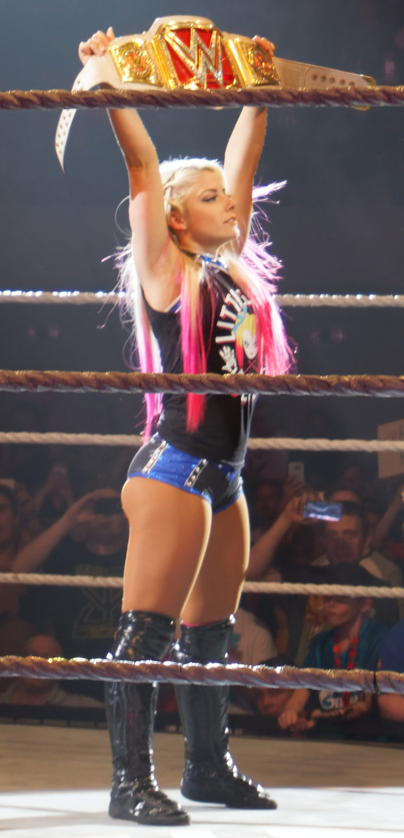 P_20170201_191226_002